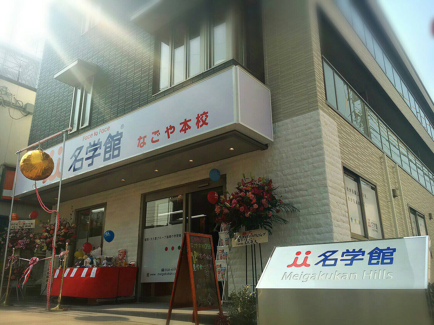 名学館ホールディングス本社前